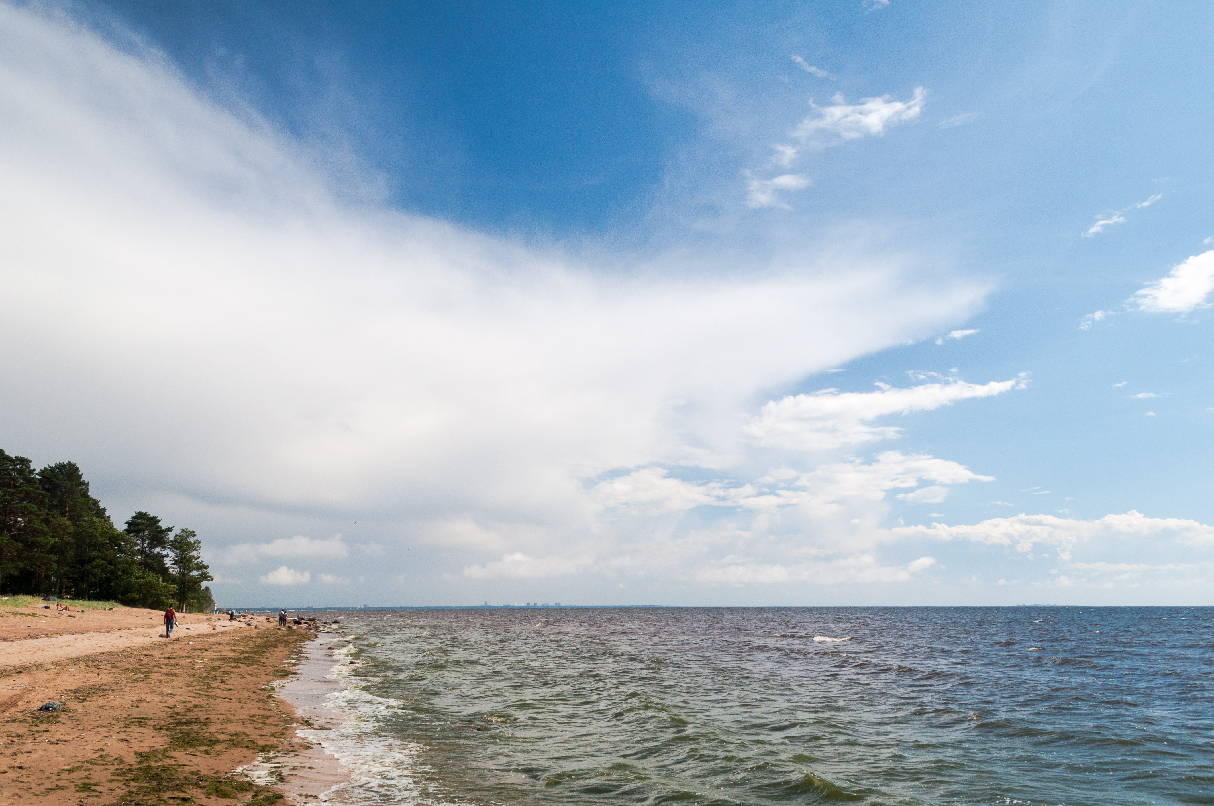 Побережье Финского залива, п. Комарово, г. Санкт-Петербург, Россия